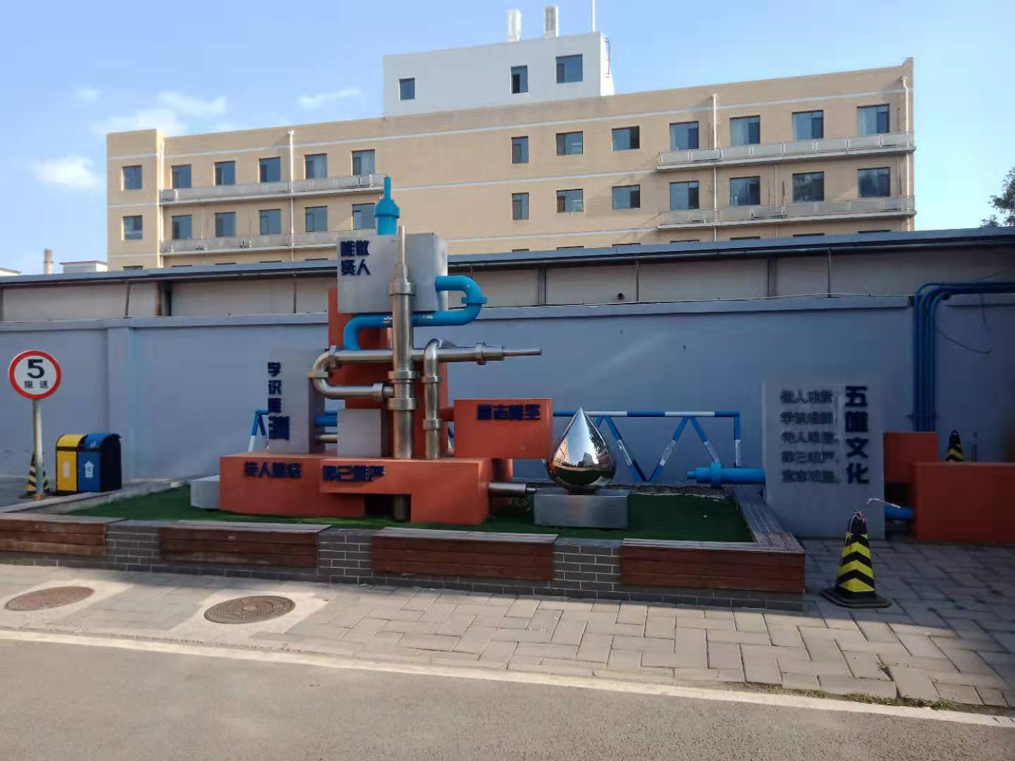 石油附中五唯文化雕塑